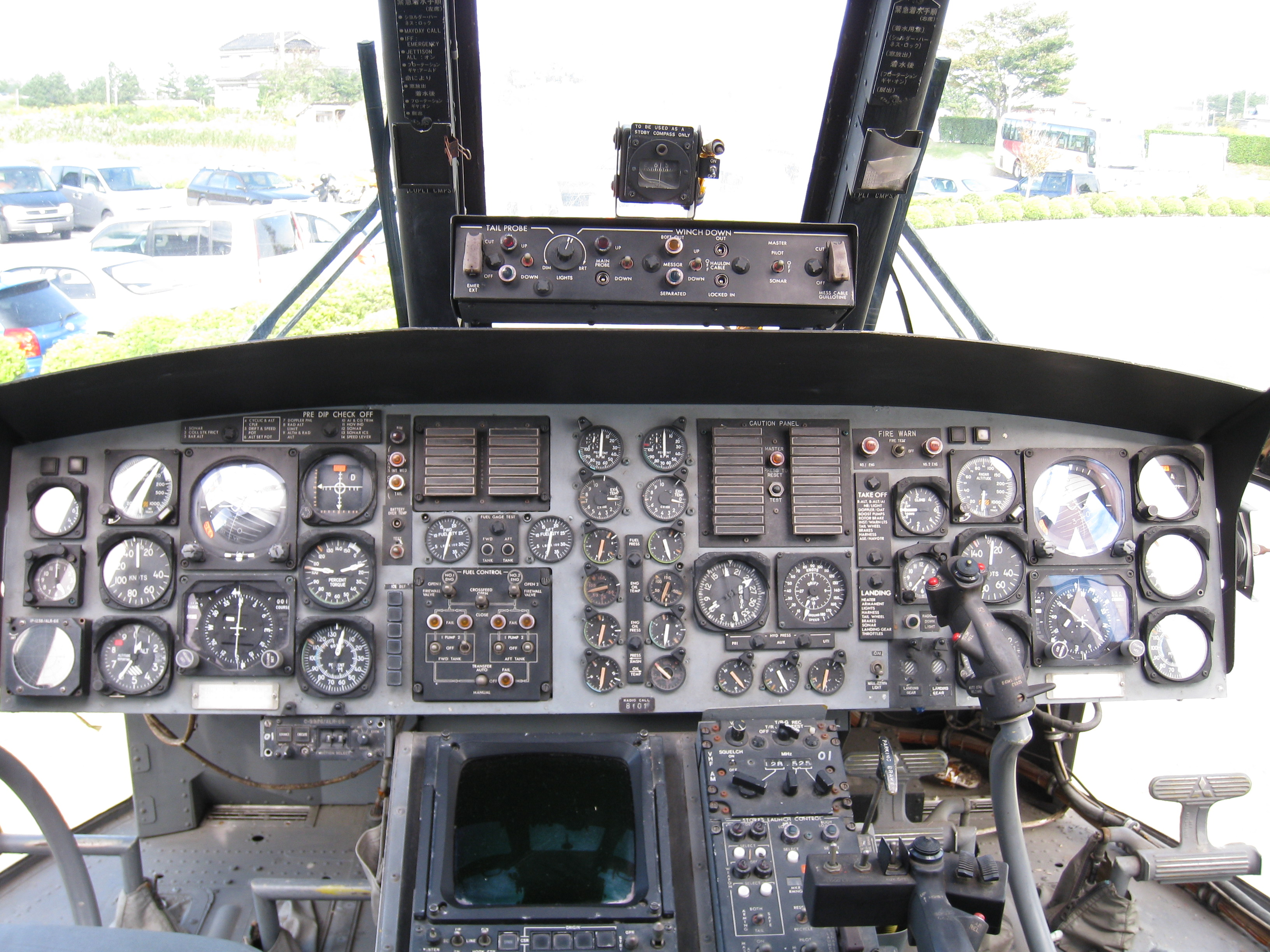 対潜哨戒ヘリ「HSS-2B」。石川県小松市（石川県立航空プラザ内）Helicopter "HSS-2B", at Ishikawa Aviation Plaza (石川県立航空プラザ), Komatsu, Ishikawa, Japan